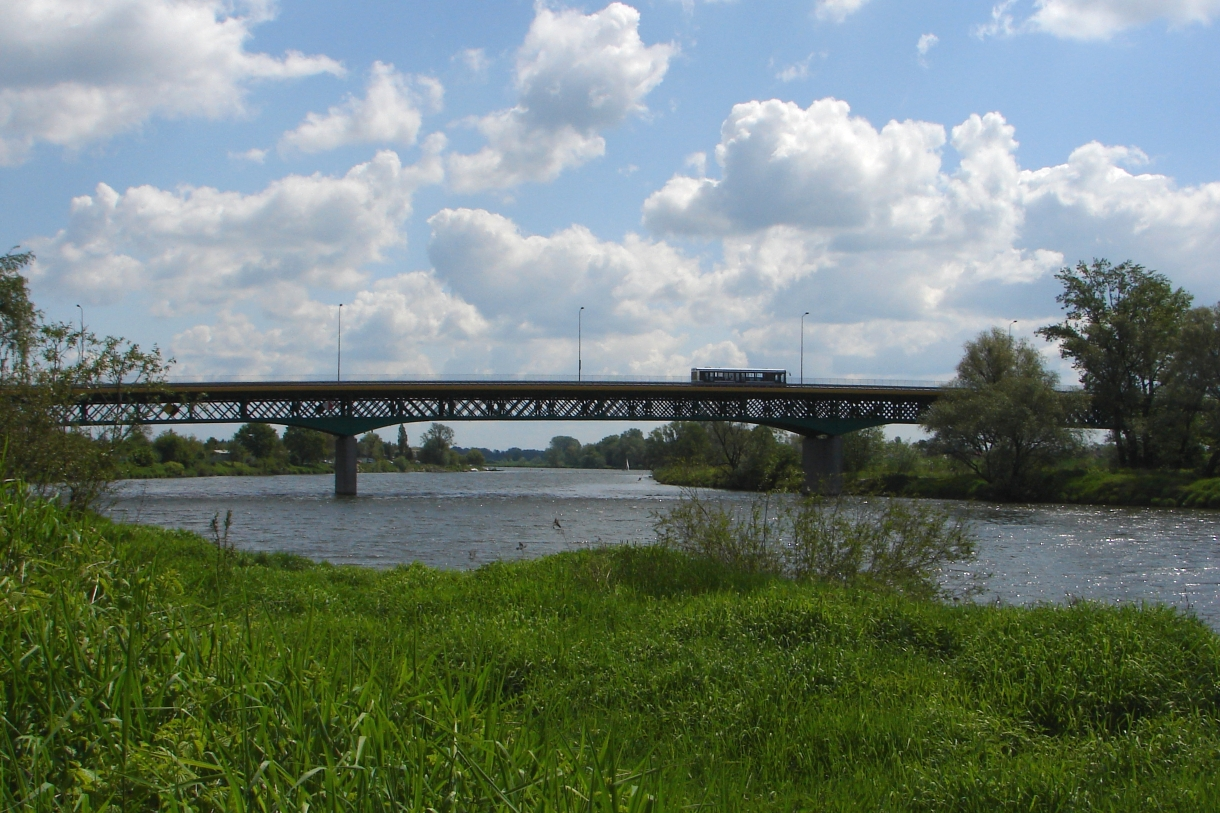 Most Wandy w Krakowie